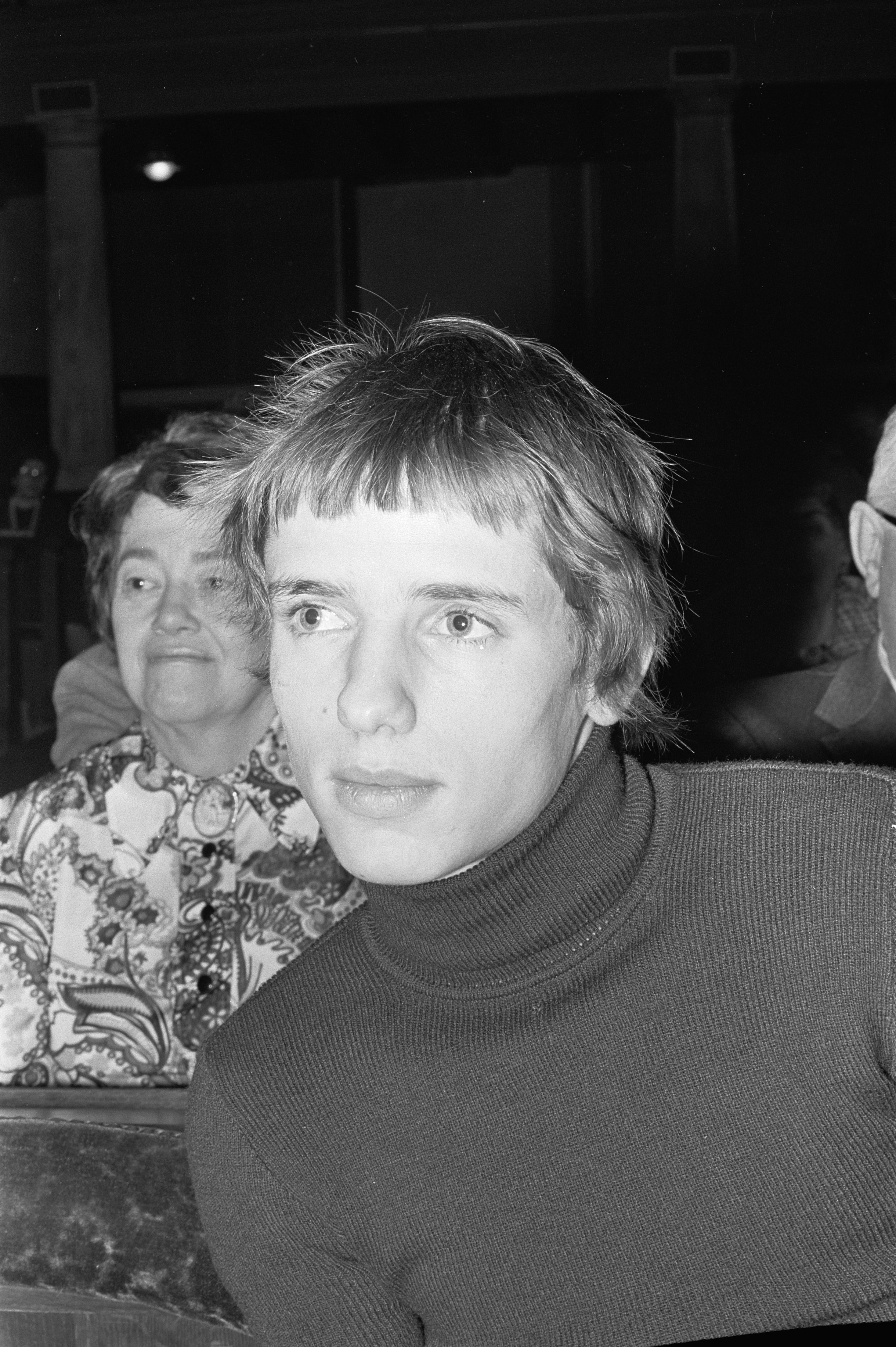 Collectie / Archief : Fotocollectie Anefo Reportage / Serie : Reina Prinsen Geerligsprijs 1972 Beschrijving : Reina Prinsen Geerligsprijs uitgereikt aan dichter Willem Jan Otten Datum : 24 november 1972 Locatie : Amsterdam, Noord-Holland Trefwoorden : dichters, literatuur, poezie, portretten, prijsuitreikingen, schrijvers Persoonsnaam : Otten, Willem Jan Fotograaf : Rob Croes / Anefo Auteursrechthebbende : Nationaal Archief Materiaalsoort : Negatief (zwart/wit) Nummer archiefinventaris : bekijk toegang 2.24.01.05 Bestanddeelnummer : 926-0500